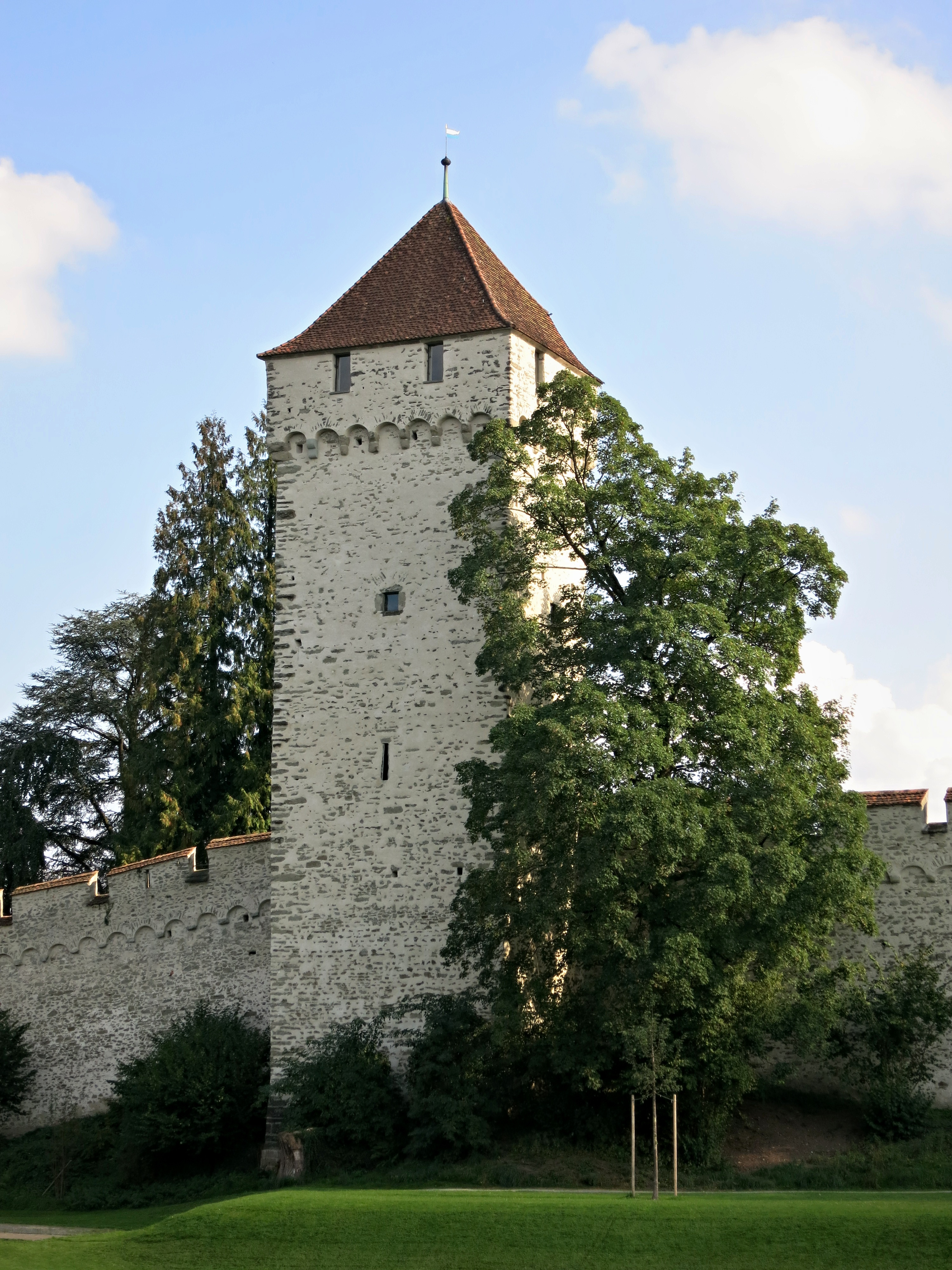 Zytturm